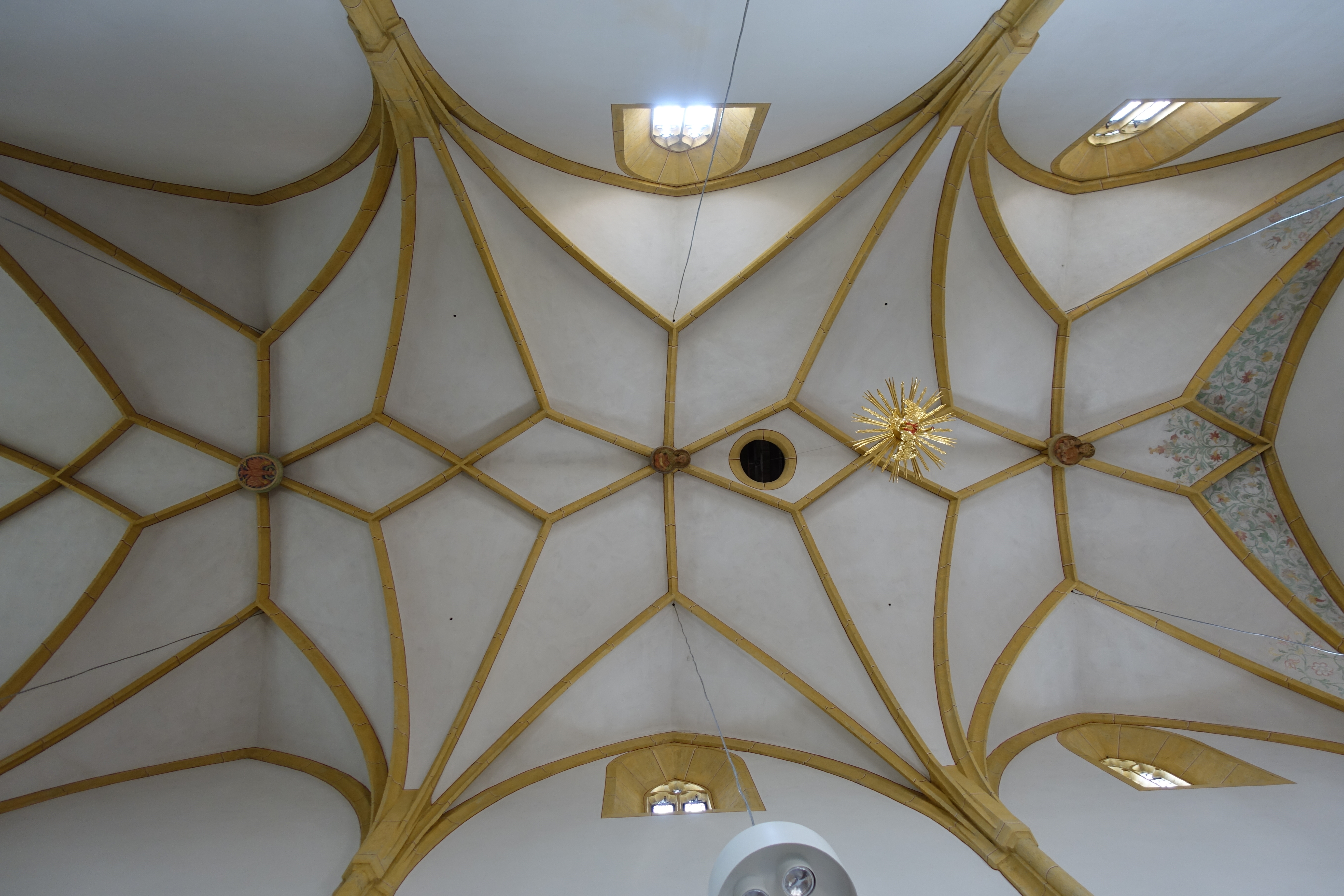 Landeck, Tirol, Österreich. Katholische Pfarrkirche Mariä Himmelfahrt, Mittelschiffgewölbe